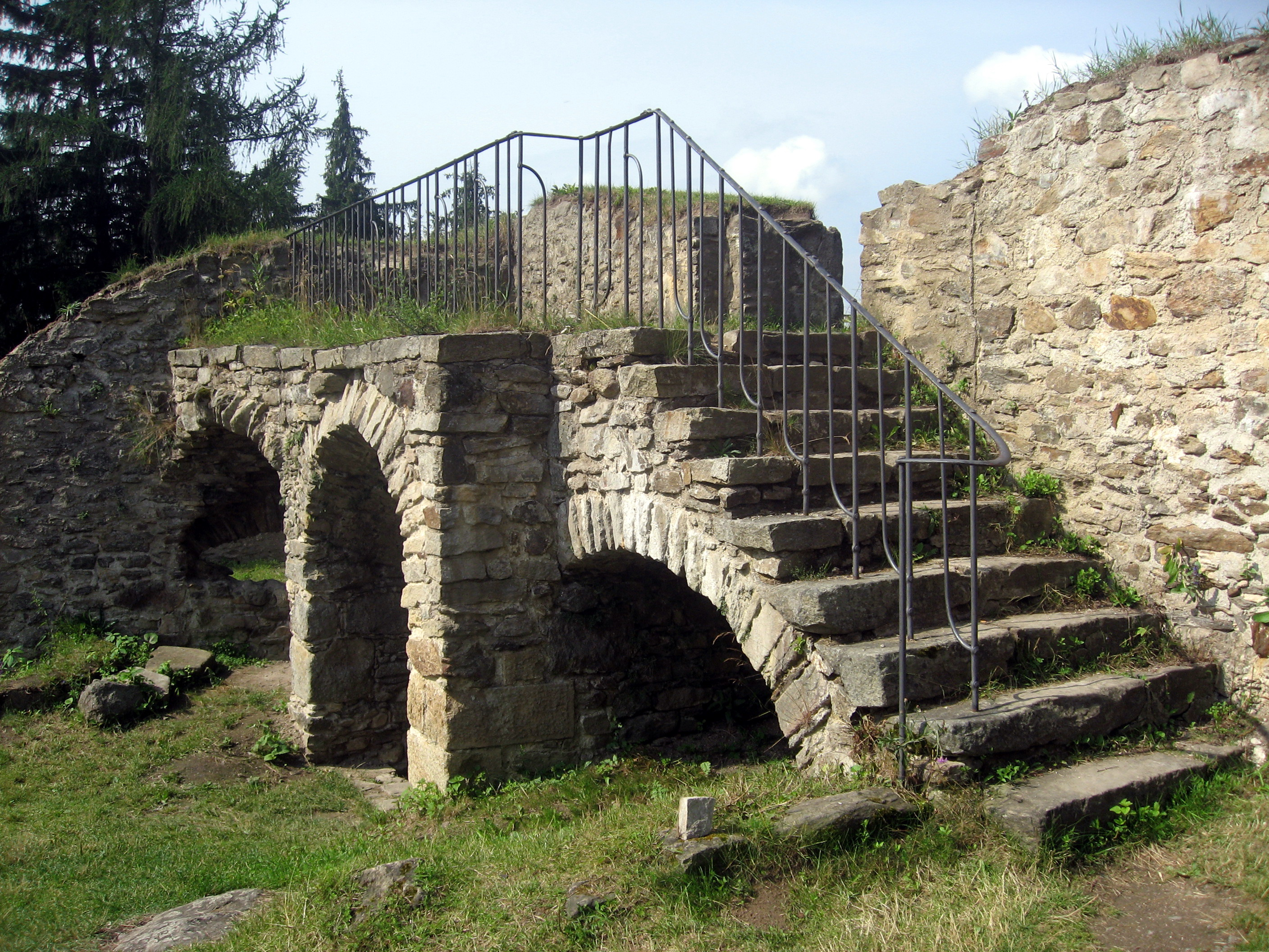 Zřícenina hradu Orlík